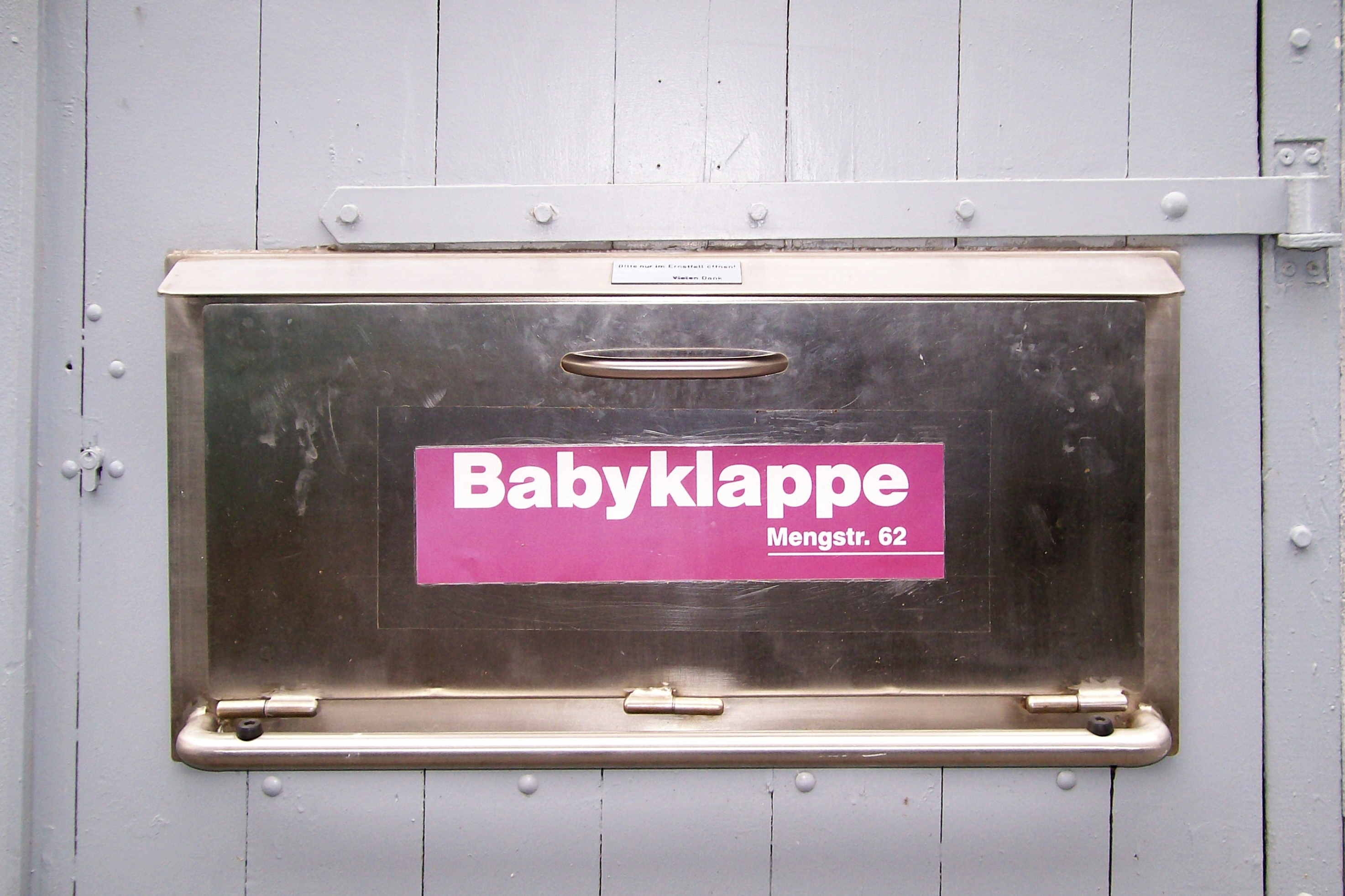 Babyklappe (baby hatch) in Lübeck, Mengstraße